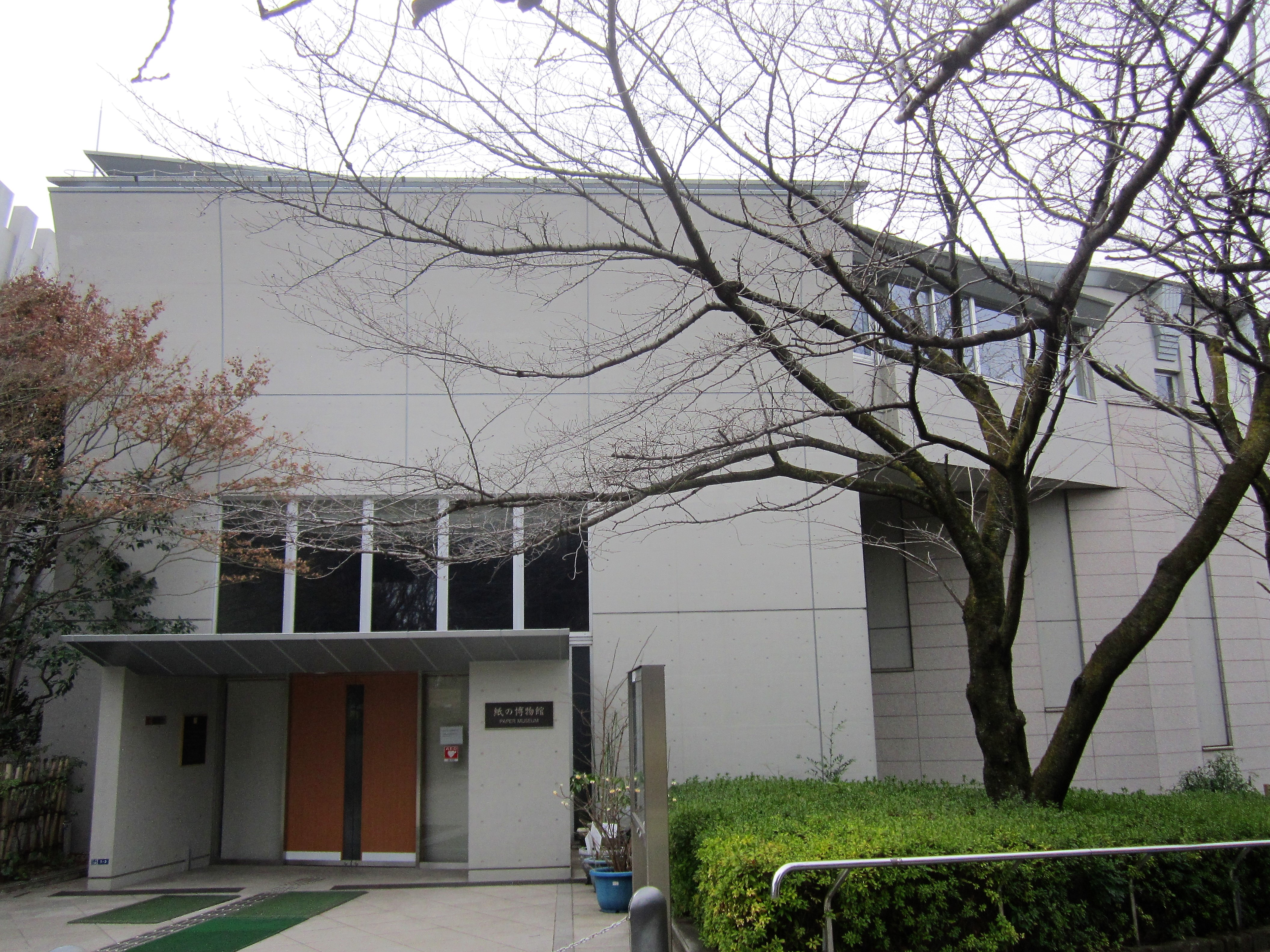 紙の博物館